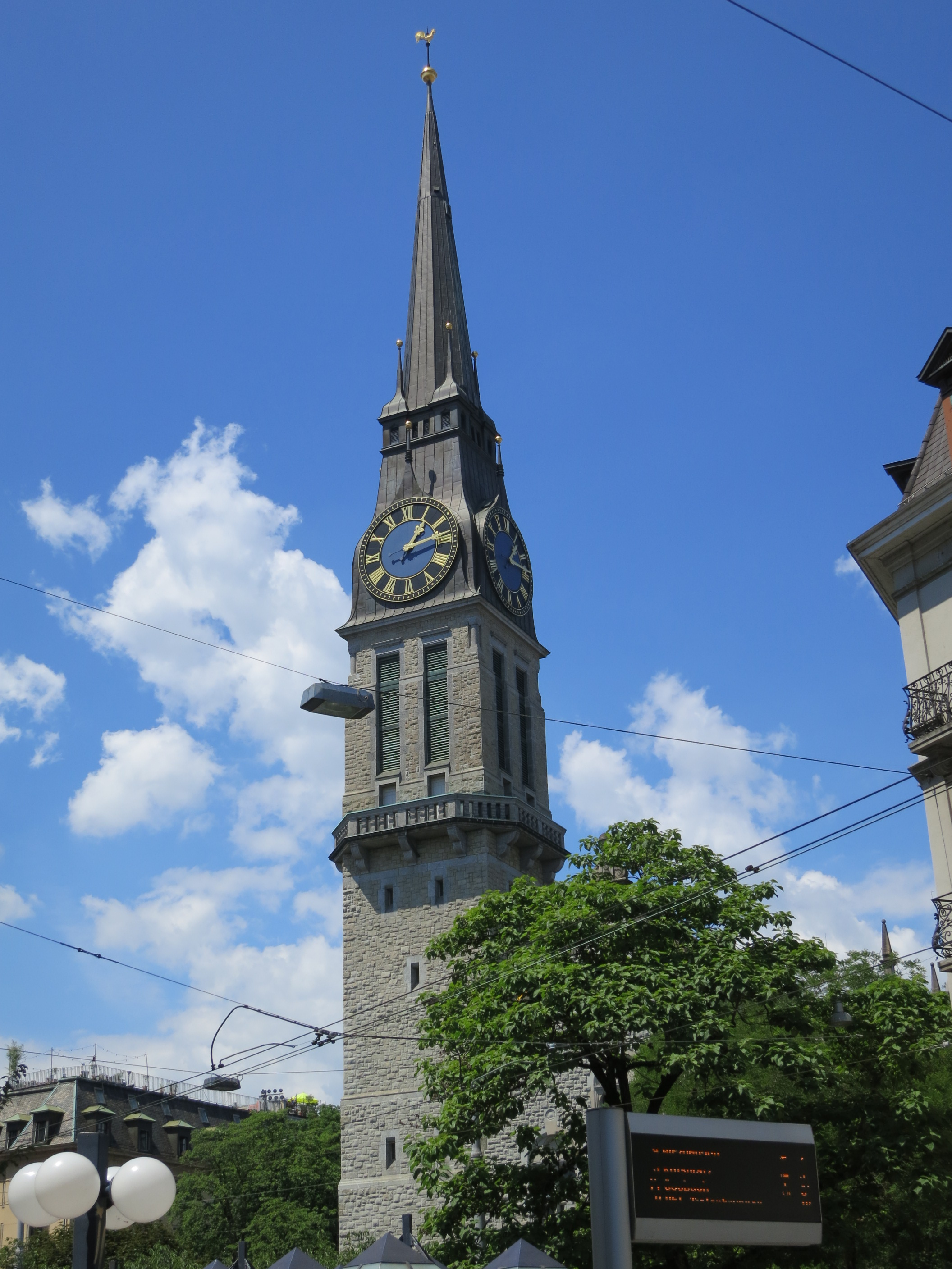 Kirche St. Jakob, Zürich, Schweiz